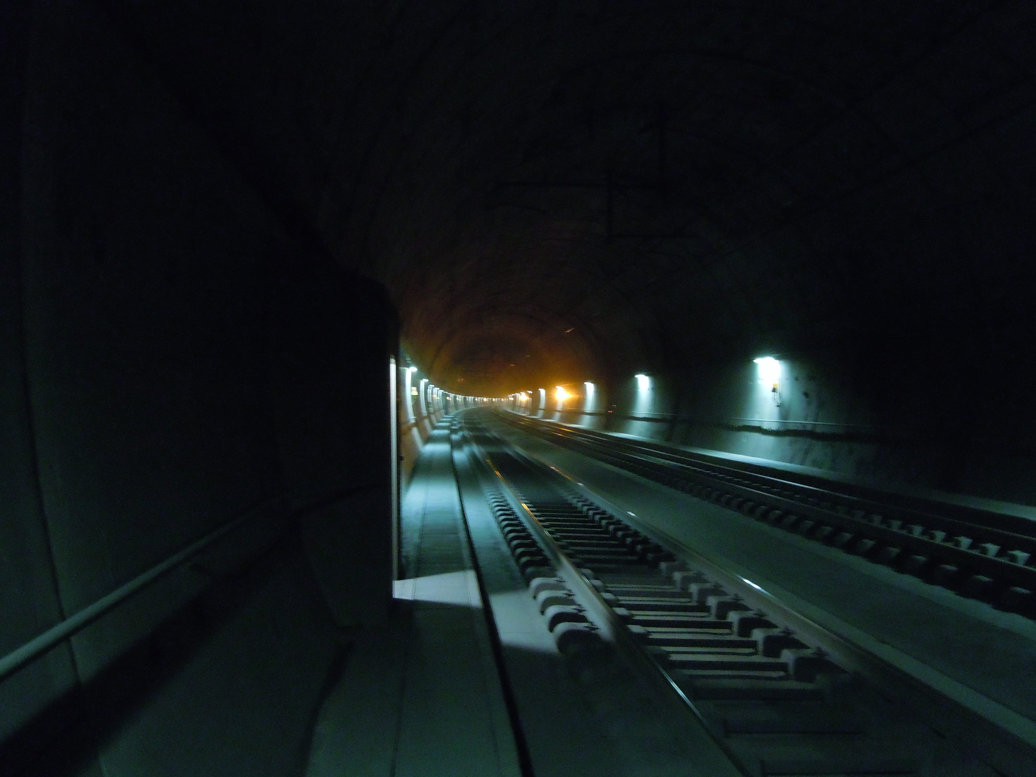 Grauholztunnel im Innern mit eingeschalteter Tunnelbeleuchtung sowie Warnanlage